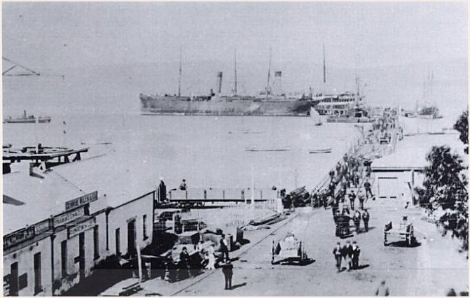 SS Ferrett